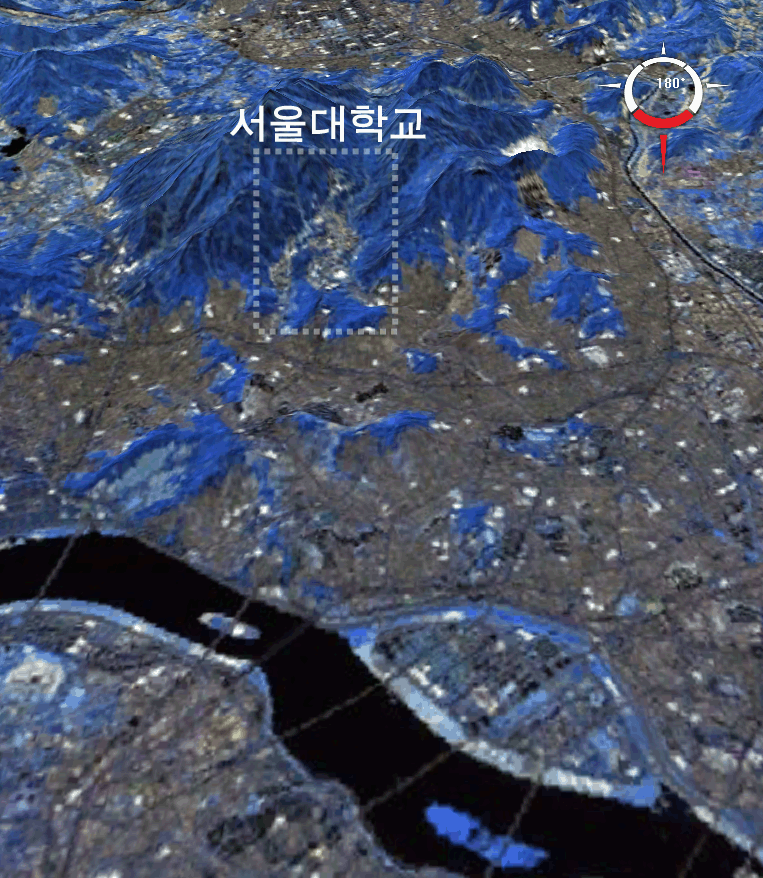 NLT Landsat7 자료로 재구성한 서울대학교 관악캠퍼스 주변 모습. 윗쪽이 남쪽이며, 아랫쪽에 한강과 여의도가 보인다. 색깔은 인공적으로 입힌 것으며, 파랗게 솟아오른 부분이 산이다. 학교를 감싸고 있는 산은 관악산이며, 산 너머로는 안양시이다.